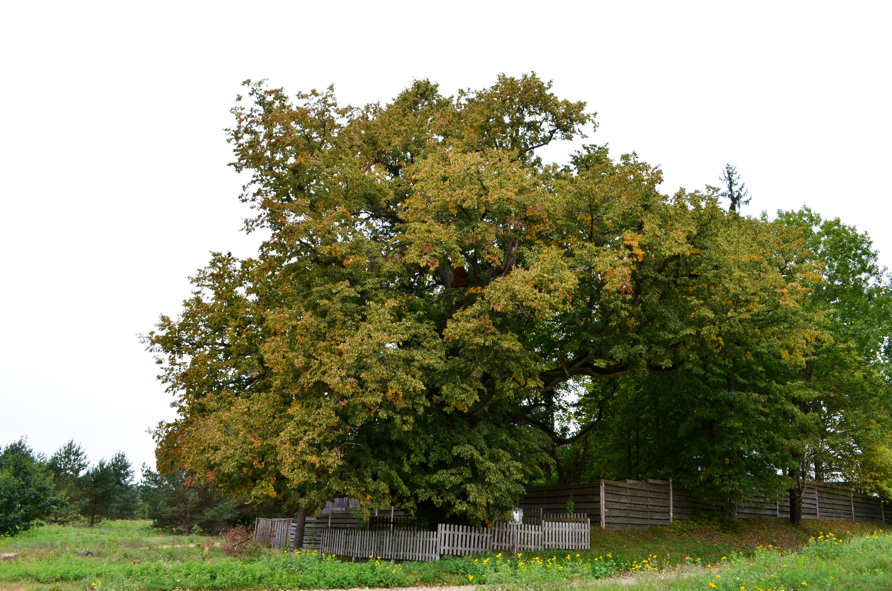 Braziūkų liepa Motinėlė, Kauno raj.